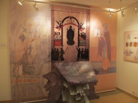 Экспозиция "Культурное наследие Новгородских монастырей"